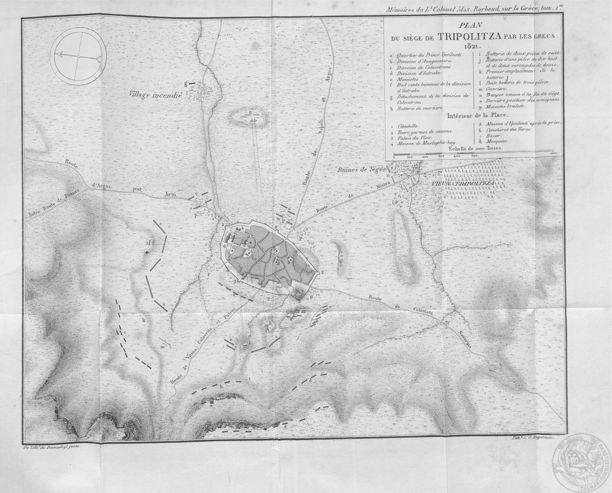 Plan du siège de Tripolizza / Map of the siege of Tripolizza (1821)